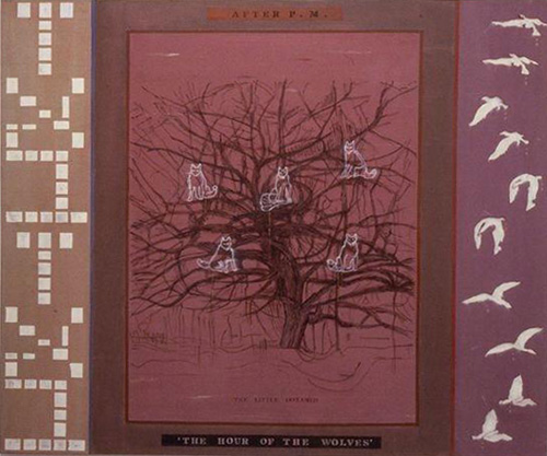 繪畫